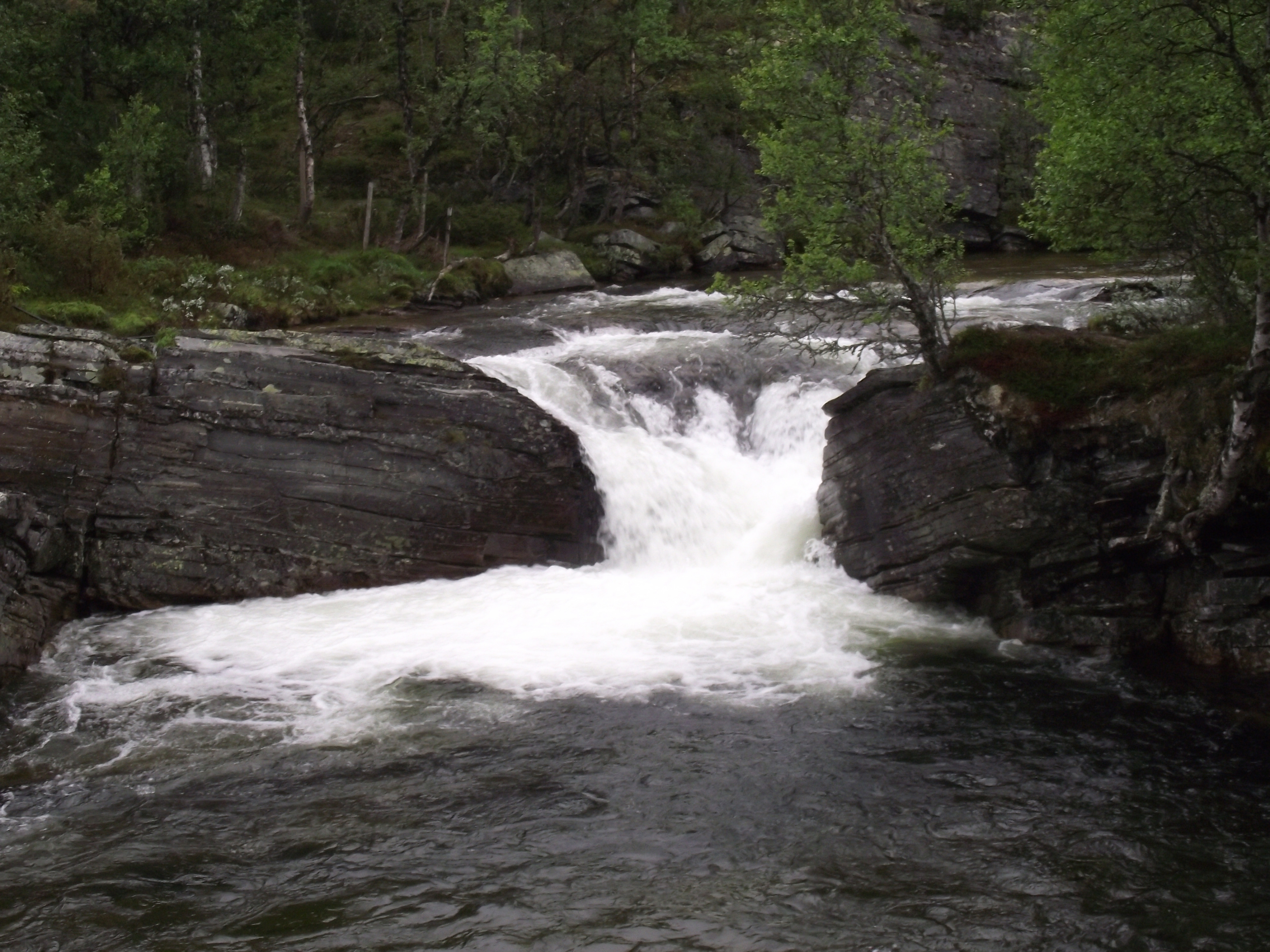 Ula, Mysusaeter